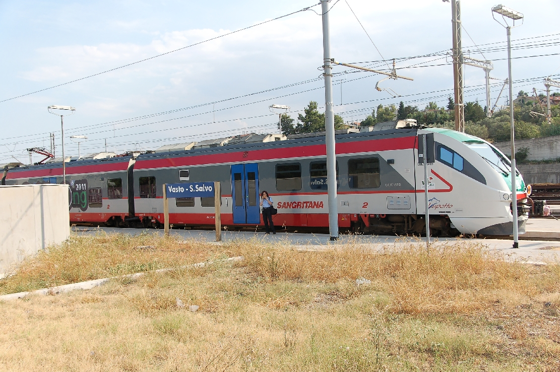 Ferrovia Adriatico Sangritana 2011 in Vasto